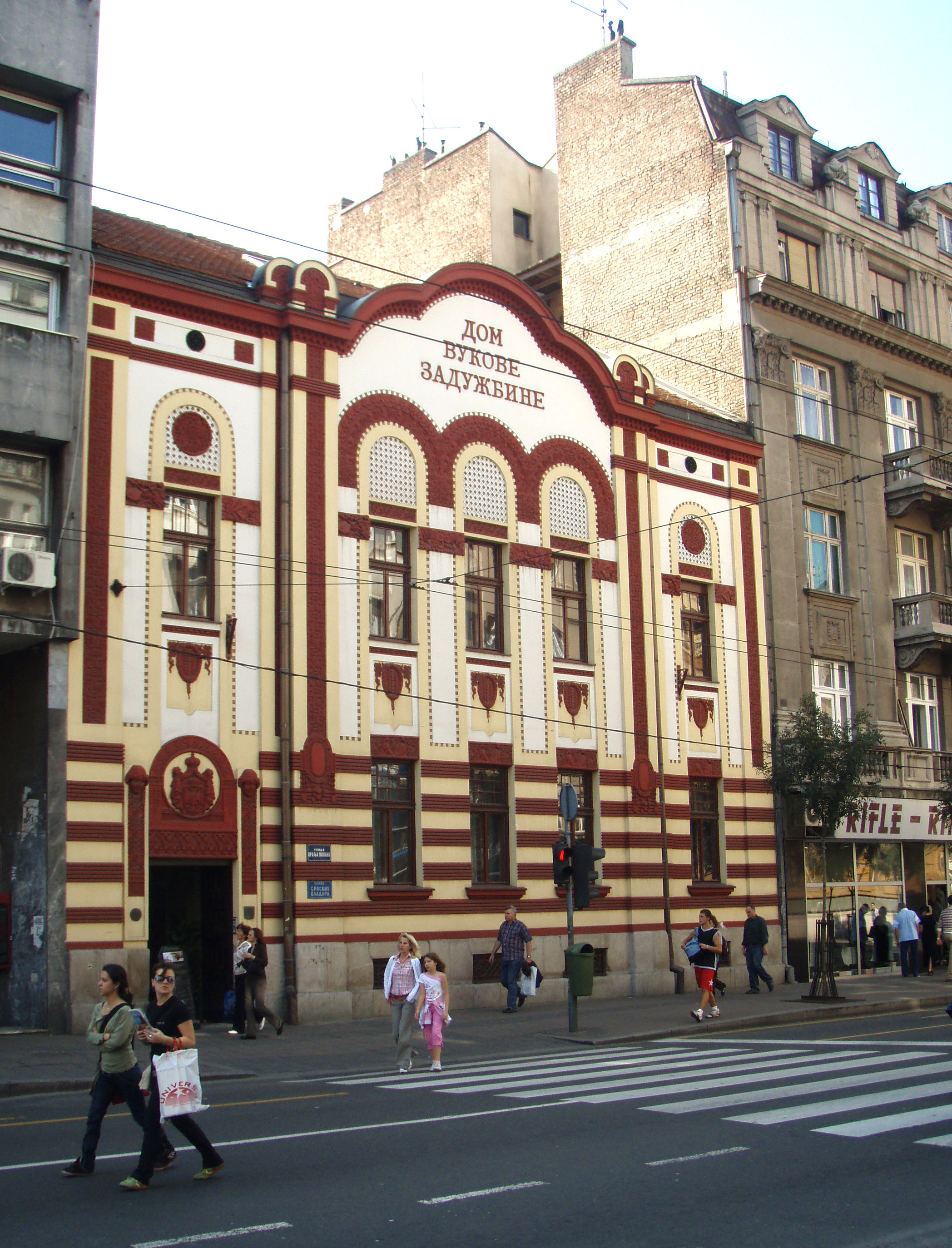 Building of Vukova zaduzbina / Вукова задужбина у Београду